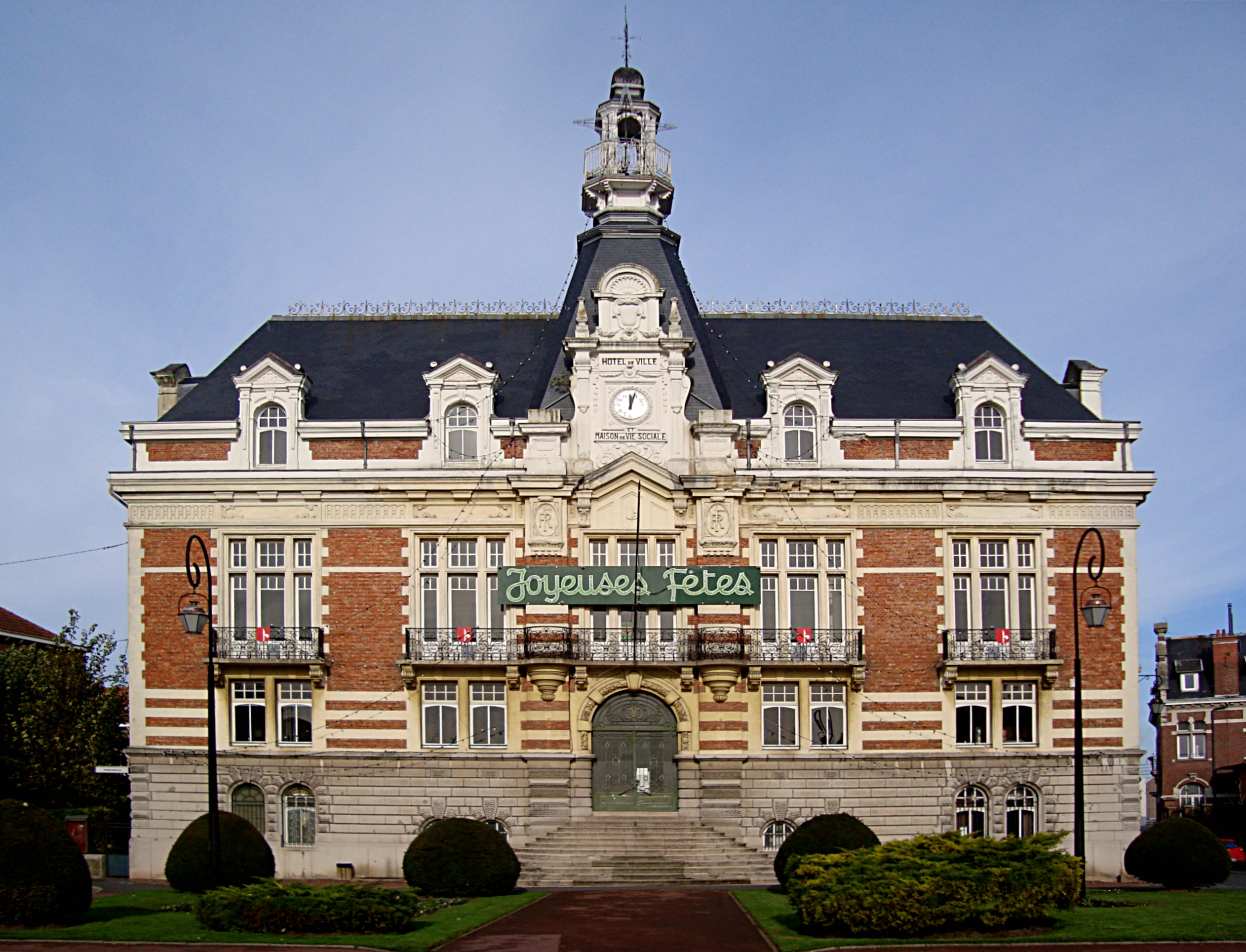 L'hôtel de ville de La Bassée (Nord).